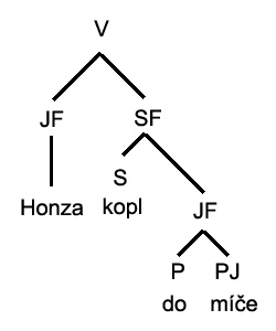 Příklad derivačního stromu na větě "Honza kopl do míče".